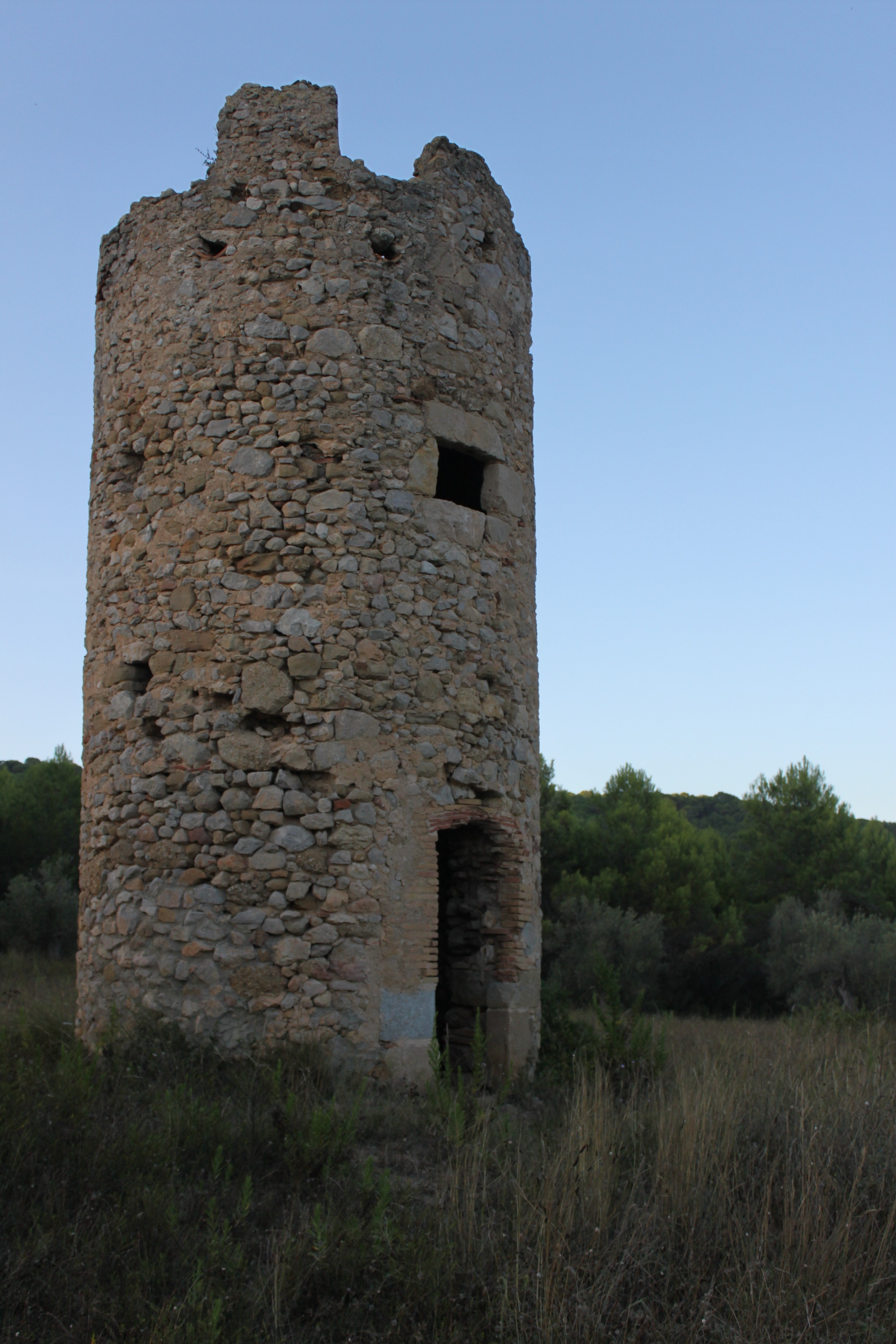 Imatge de la torre dels Moscats situada a la falda del Montgrí entre Torroella de Montgrí i l'Estartit. La seva funció principal, per la seva excel·lent posició, segurament tenia una funció de vigilància i en menor mesura per la defensa.